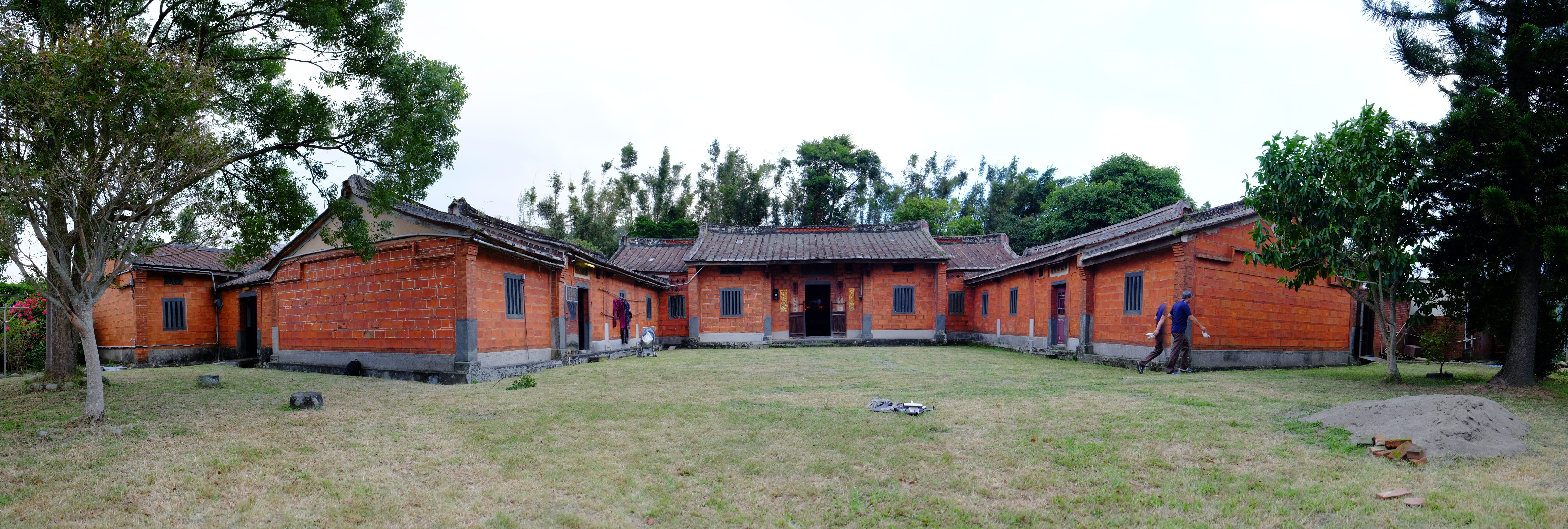 中文（台灣）: 20161031大溪簡送德古宅